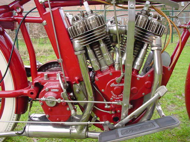 Toestemming van Yesterdays Antique Motorcycles (